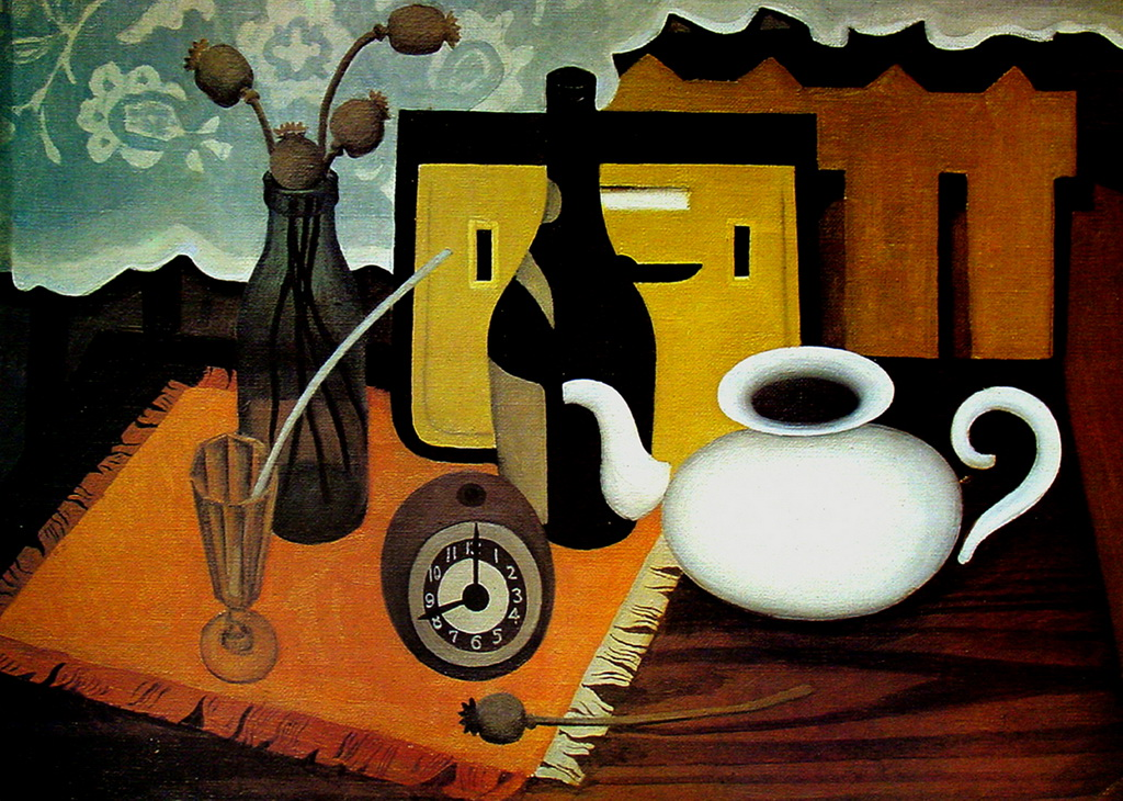 Живопись В.Каракашева "Спидола" 1964г.